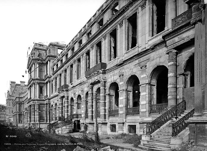 Ruines